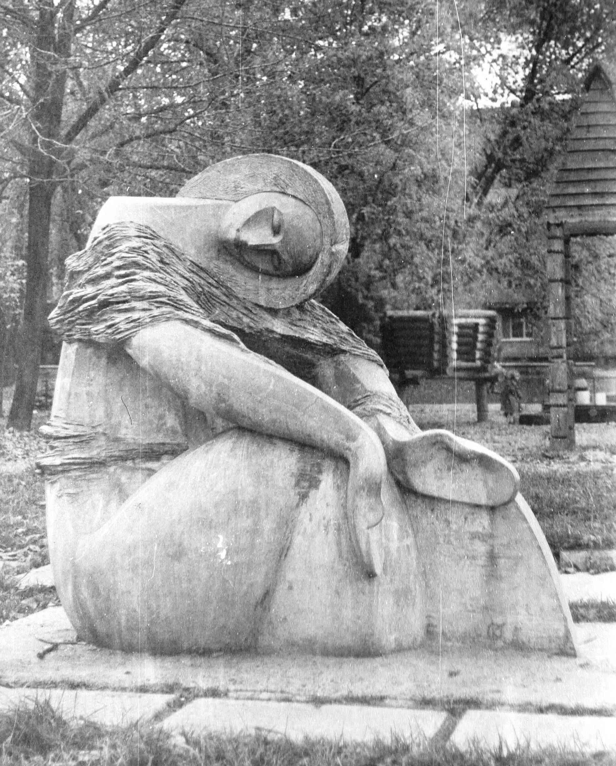 Парковая скульптура «Пробуждение». Сквер по улице Харитонова, г. Кривой Рог, 1989 год.